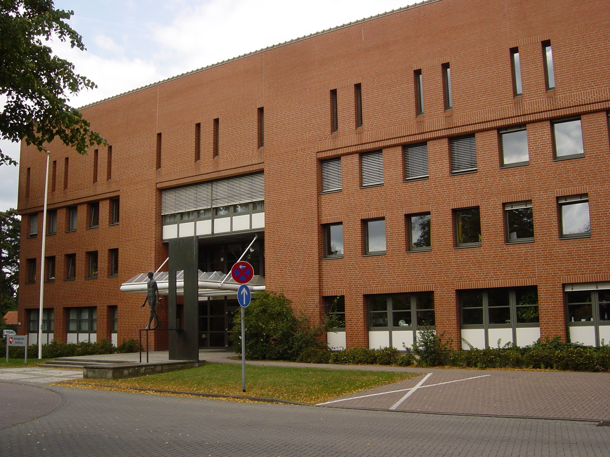 Amtsgericht Wolfsburg mit Skulptur "Menschenrechte", Rothenfelder Straße 43, 38440 Wolfsburg